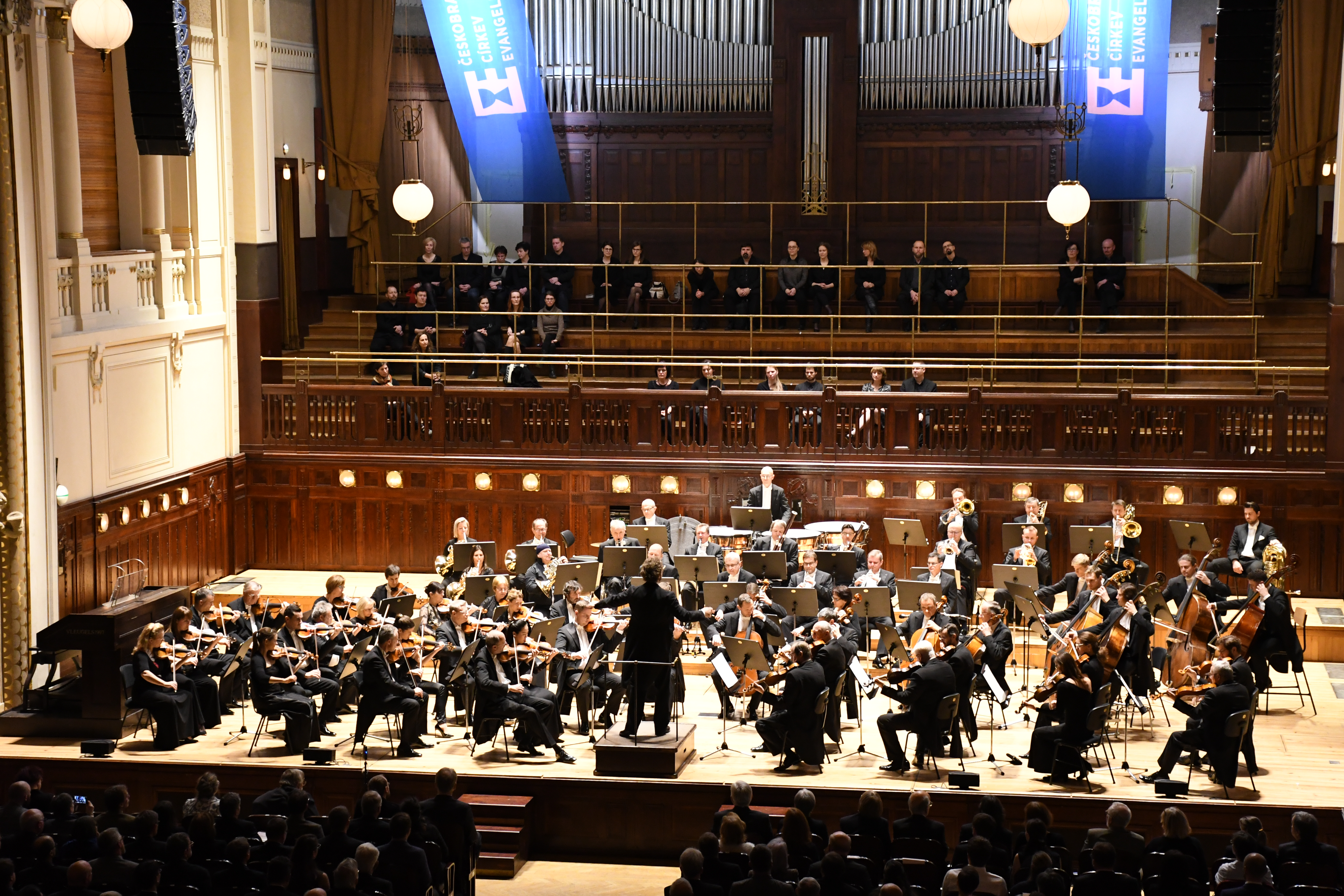 Oslavy 100 let Českobratrské církve evangelické, Dvořákova Novosvětská v podání Symfonického orchestru hlavního města Prahy FOK